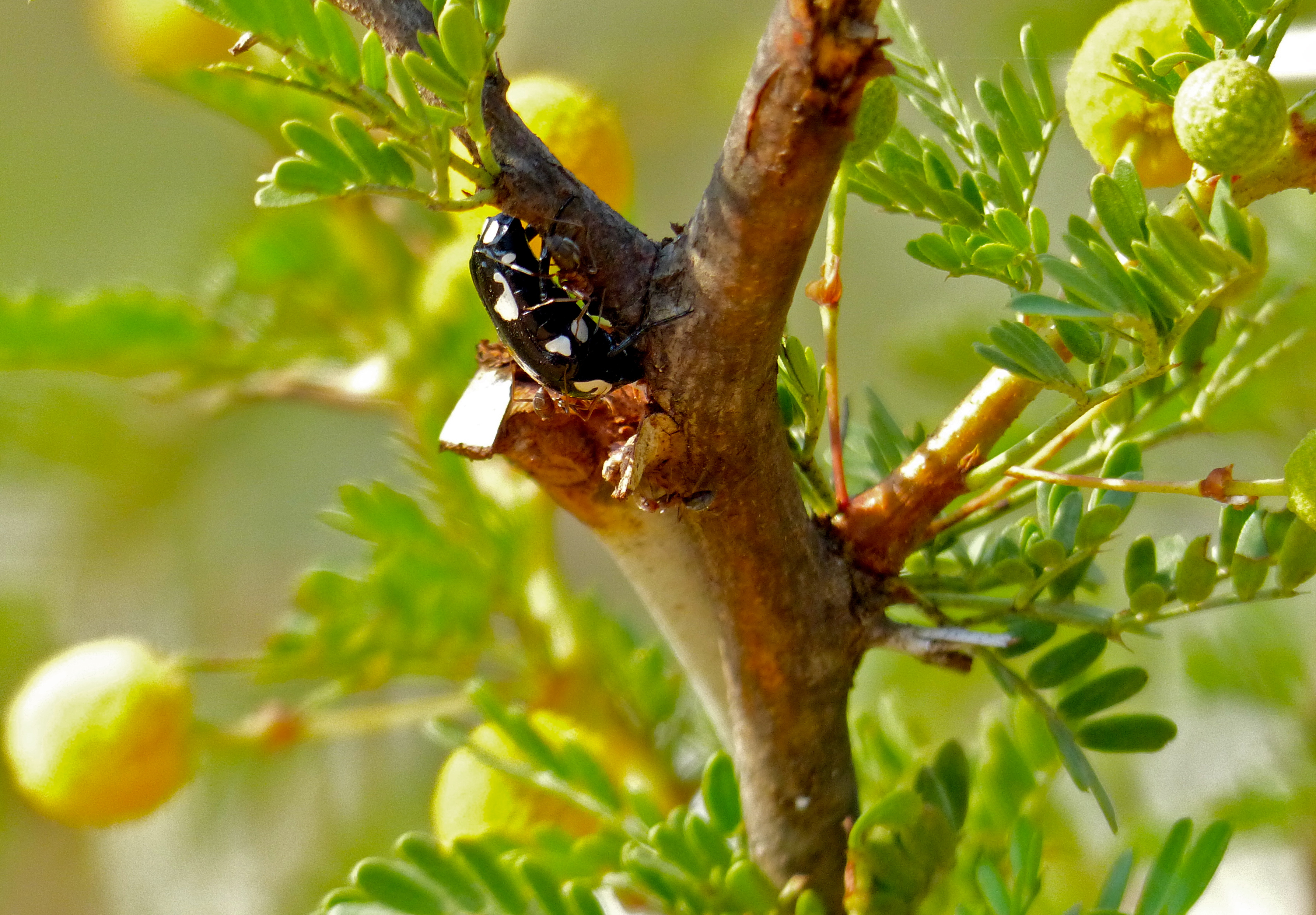 S25 (Crocodile) Road, Kruger NP, SOUTH AFRICA